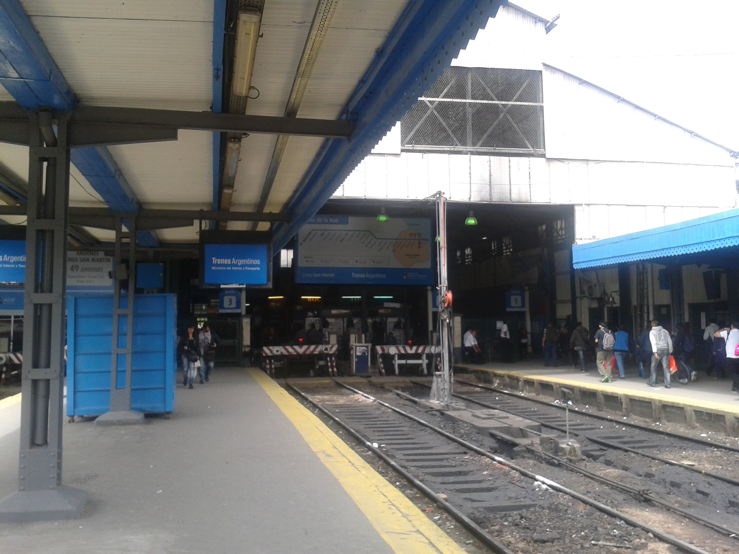 Andenes 3 y 2